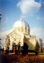 Церква у c. Лівчичі (Жидачівський деканат). 1906 р., архітектор В. Нагірний (1848—1921)